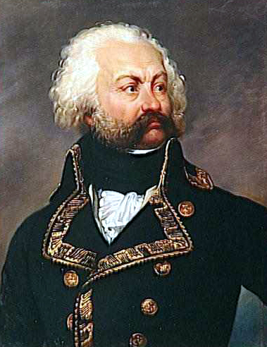 Portrait of Adam Philippe, Comte de Custine (1740-1793)